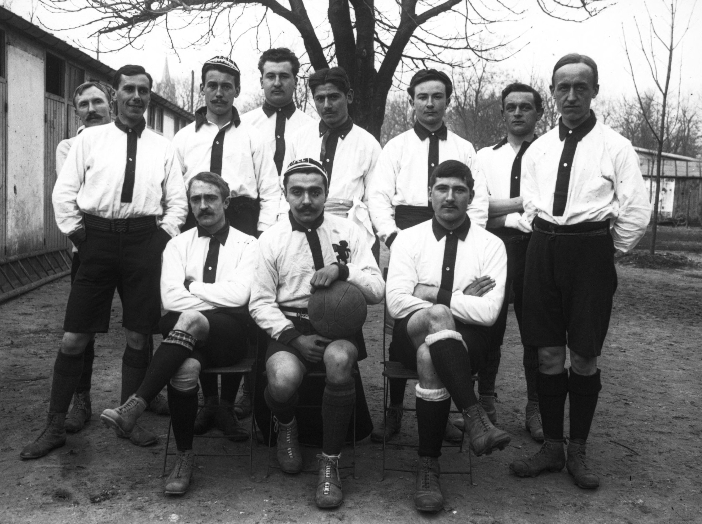 Association Football club de Lyon, 23 décembre 06, Parc des Princes [équipe de football] : [photographie de presse] / [Agence Rol].